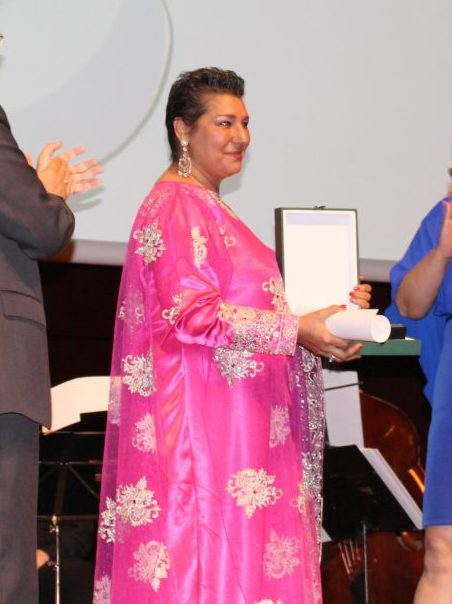 Con motivo del Día Internacional del Pueblo Gitano, la primera teniente de alcalde y delegada de Equidad, Derechos Sociales y Empleo, Marta Higueras, entregó anoche el premio Concordia a Rami Fernández, la primera profesora gitana con diversidad funcional, en la gala de los Premios Cultura Gitana que este año se ha celebrado en el auditorio del Museo Reina Sofía.